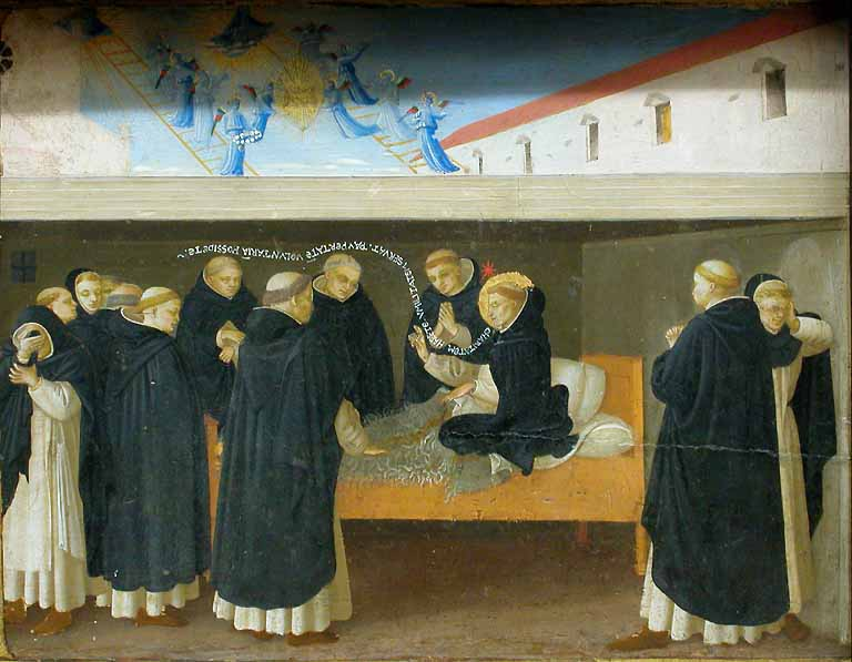 Angelico, predella dell'incoronazione della vergine del louvre, storie di san domenico, 1434-35 07 morte di San Domenico.jpg